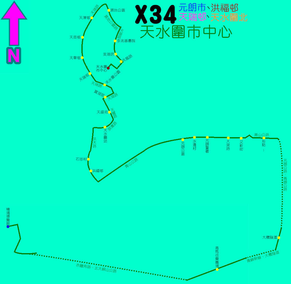 中文（香港）: 龍運巴士X34線的走線圖